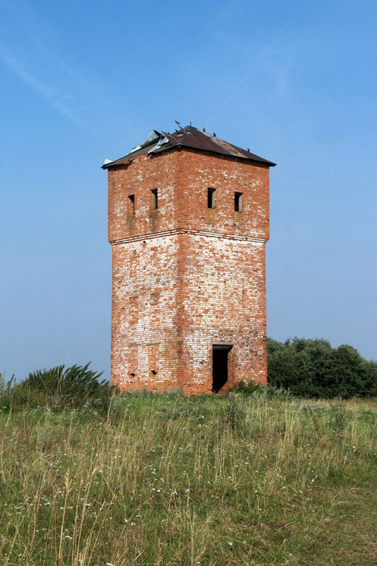 Вадацяжная вежа ля вёскі Сарочына